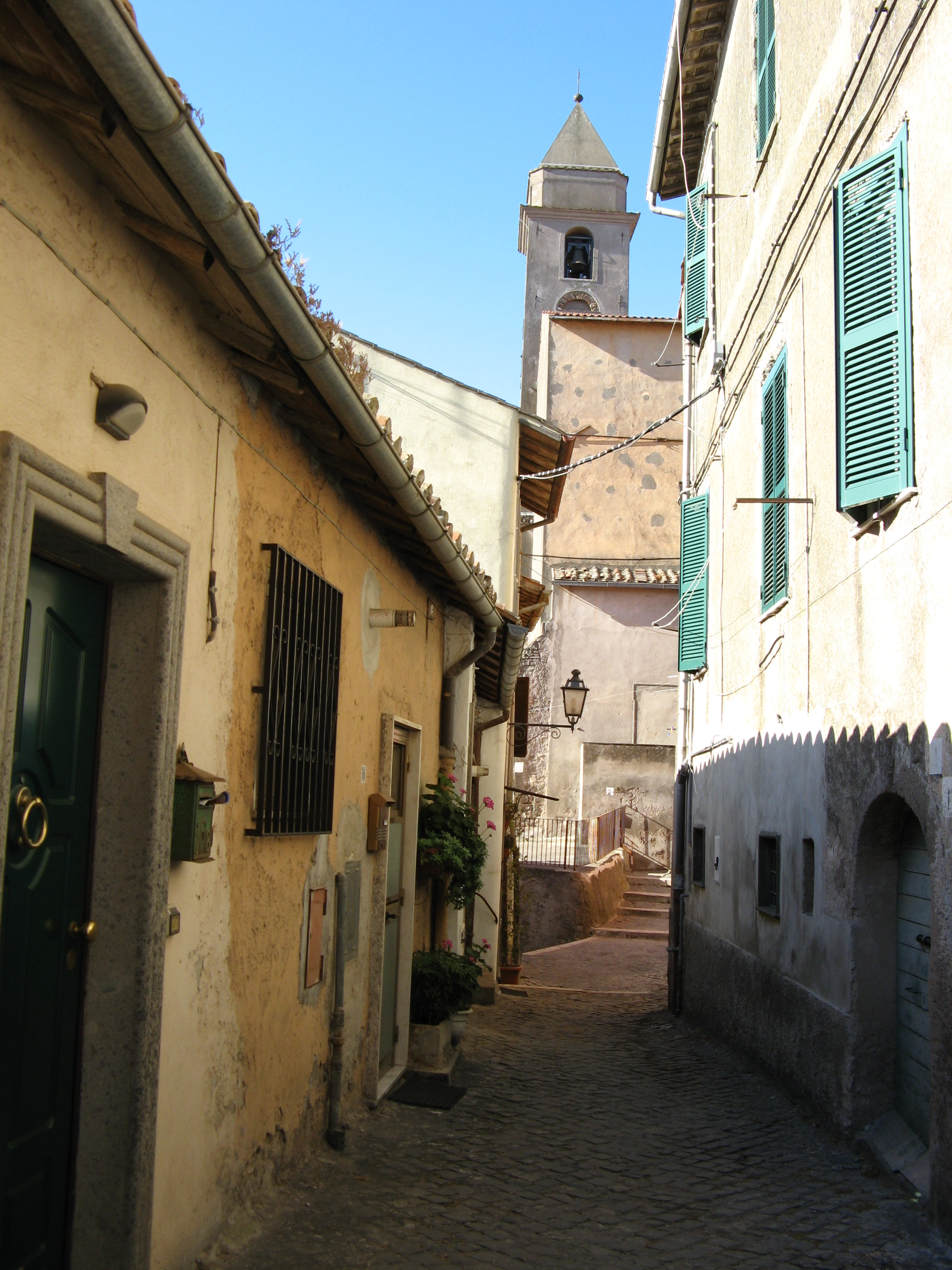 Genzano di Roma, Genzano Vecchio: Campanile di Santa Maria della Cima dal Corso Vecchio